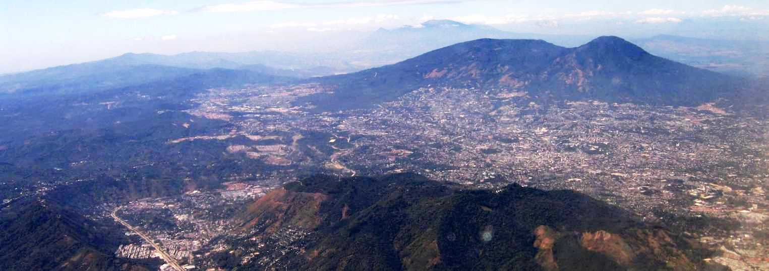 Imagen de la gran San Salvador